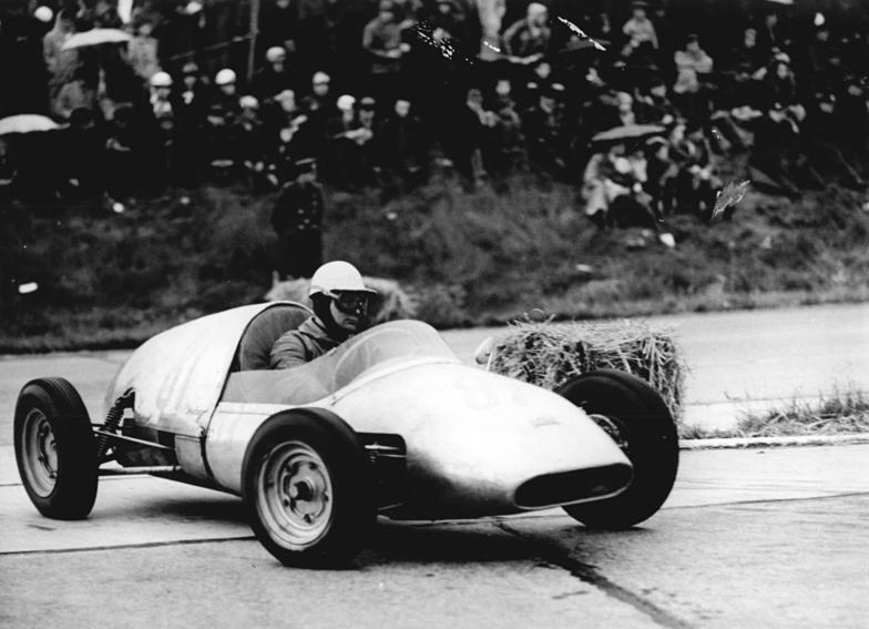 Zentralbild Gössler 28.5.61 Bernauer-Schleife-International am 28.5.61 als 7. Auto- und Motorradrennen und Deutsche Meisterschaftsläufe. UBz: Im Endlauf der Formel-Junior bis 1100 ccm siegte Heinz Melkus auf Melkus-Wartburg.